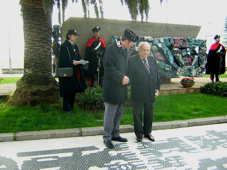 Lelio Speranza